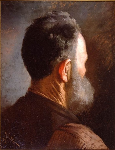 Studio di testa, 0li0 su tela, 75.5 x 61.5 cm., firmato e datato, Louisiana State Museum